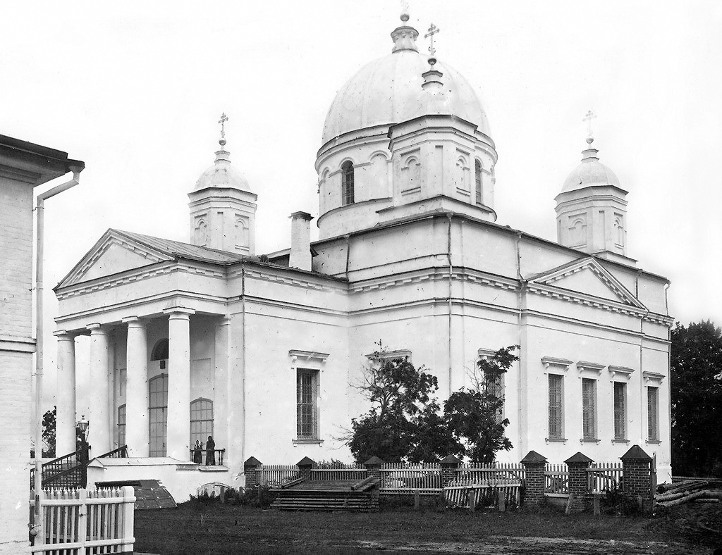 Троицкий собор Николаевского Староторжского монастыря. Фото начала ХХ века.